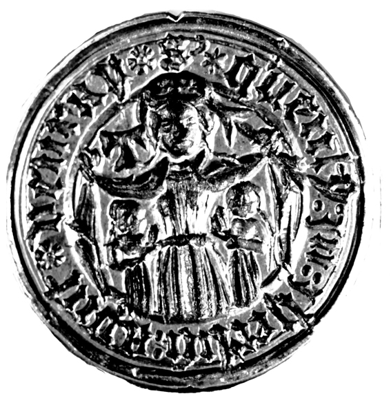 Zegel van het in 1467 gestichte klooster Jerusalem te Venray. Dit zegel bevindt zich in het Rijksarchief te Maastricht.